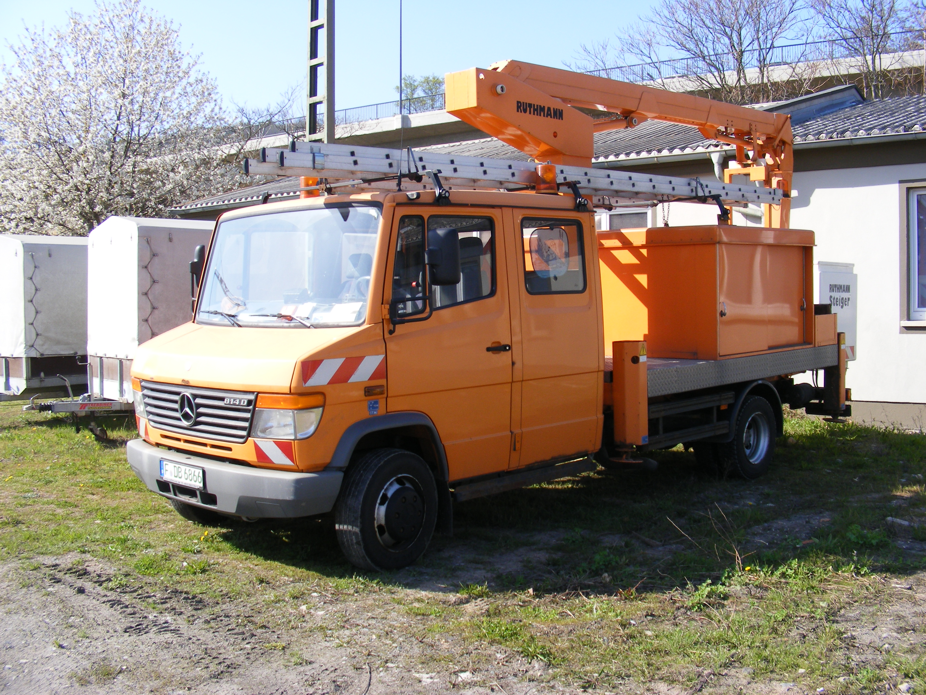 Deutsche Bahn-Fahrzeug - Mercedes Benz 814 D mit Hebebühne Ruthmann Steiger.